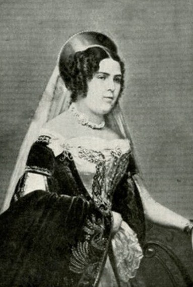 Екатерина Павловна Кожина (1828 — 1890), фрейлина Высочайшего двора, супруга инженера, действительного статского советника Александра Александровича Казначеева.